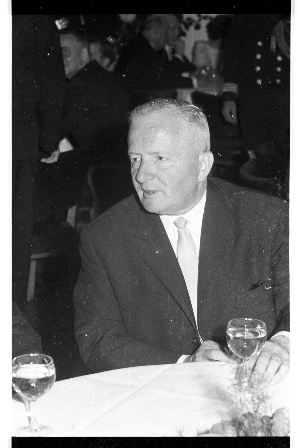 im Rathaus. Gäste im Ratssaal. Im Bild der ehem. Stadtbaurat Prof. Herbert Jensen.